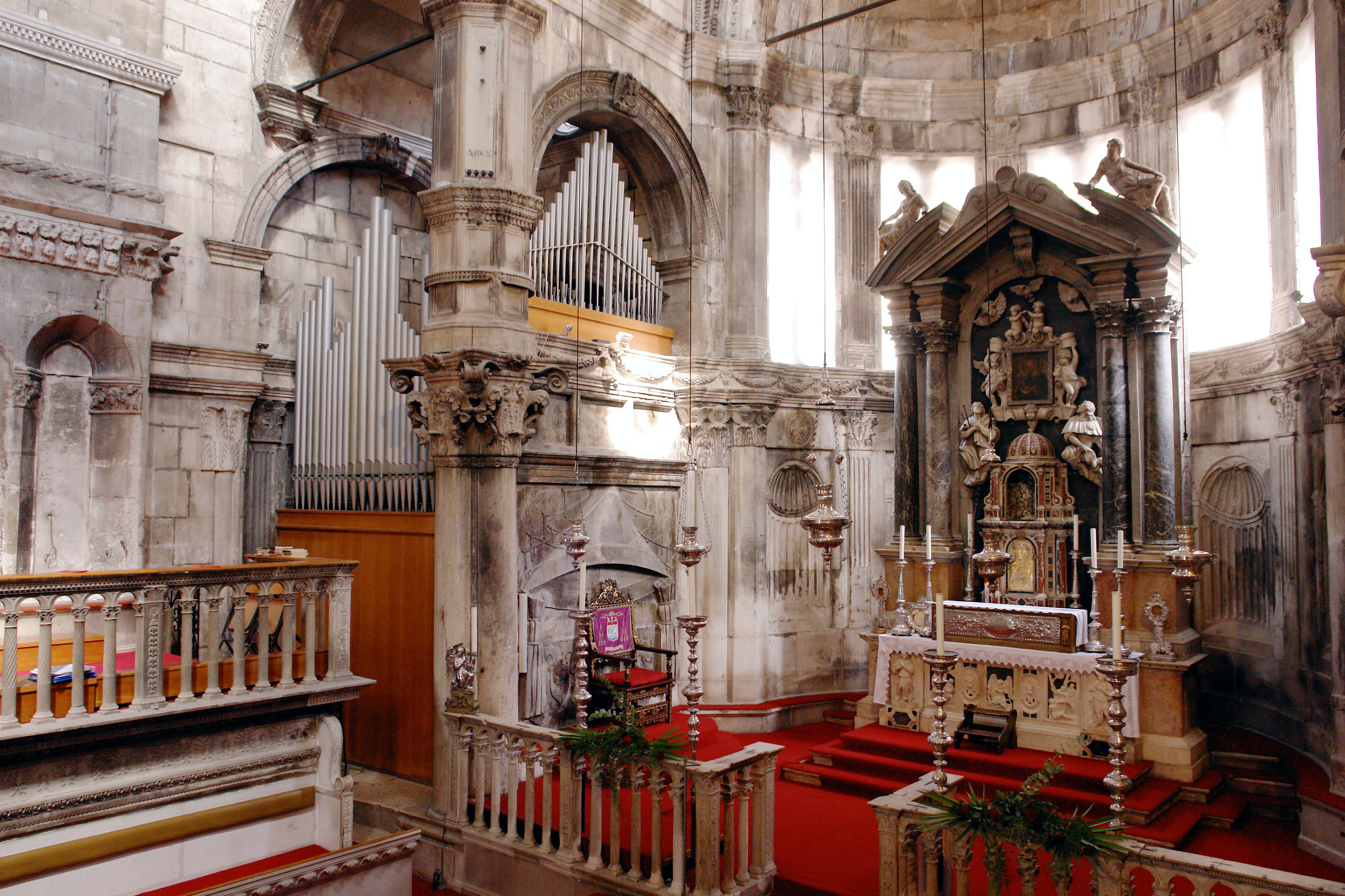 Szent Jakab székesgyeház. Cathedral of St. James, Šibenik